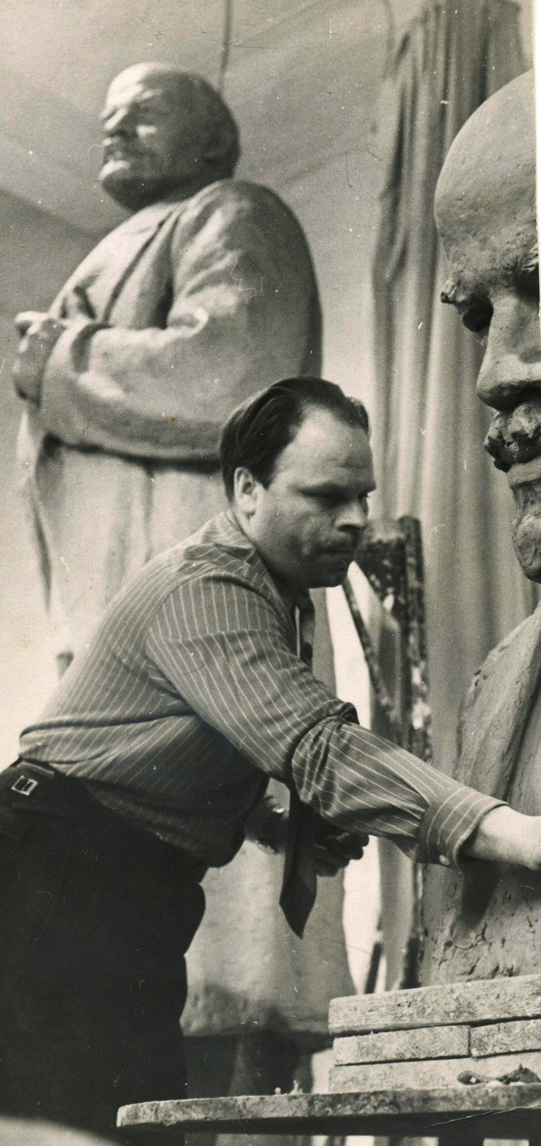 Скульптор Козырев Анатолий Иванович за работой.